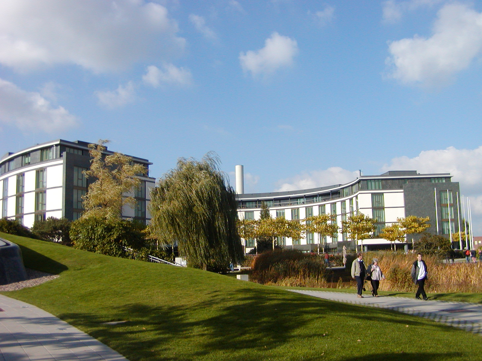 Ritz-Carlton Wolfsburg, build from Year 1998 to 2000